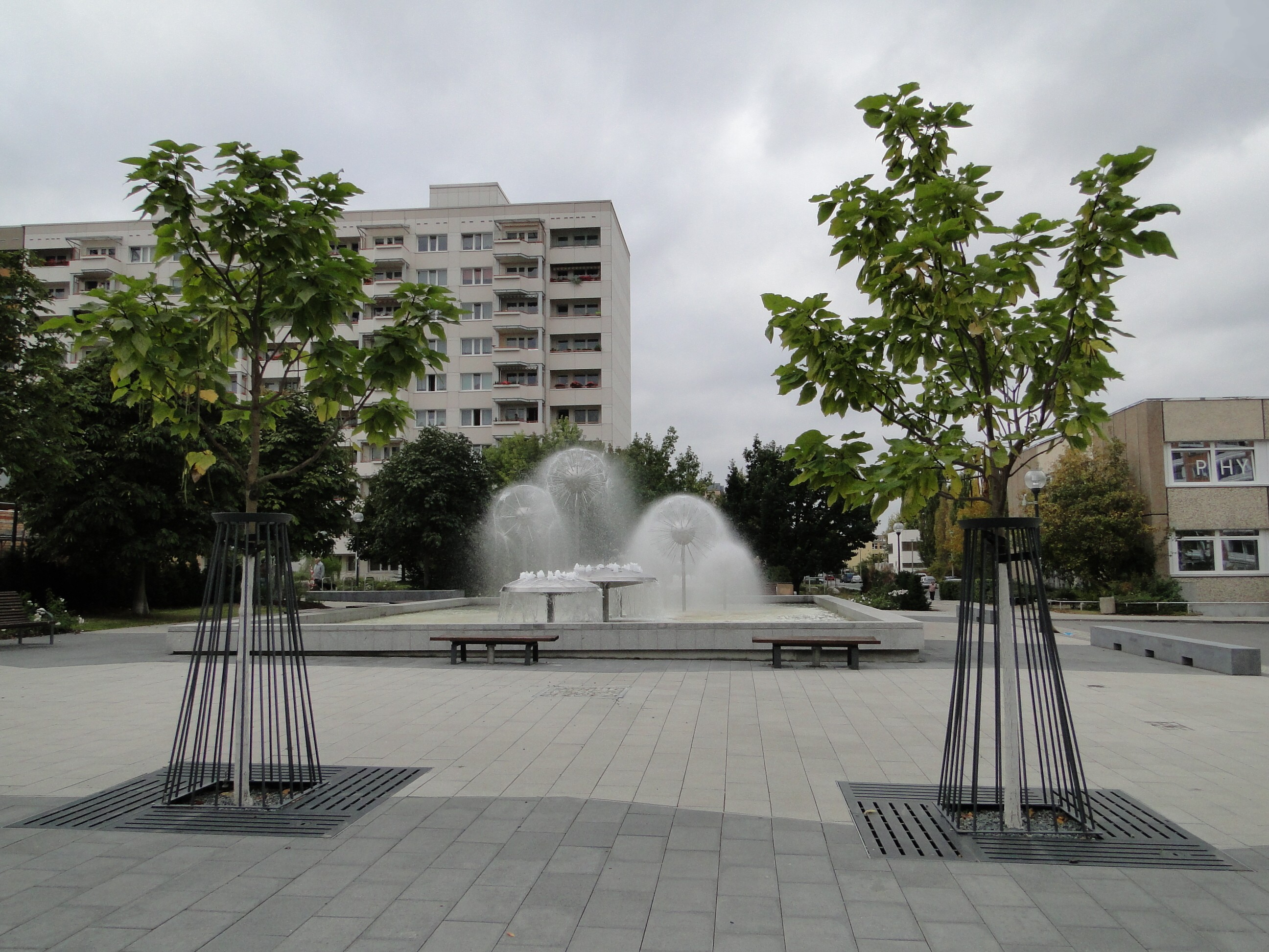 Pusteblumenbrunnen von Leonie Wirth in Dresden-Prohlis